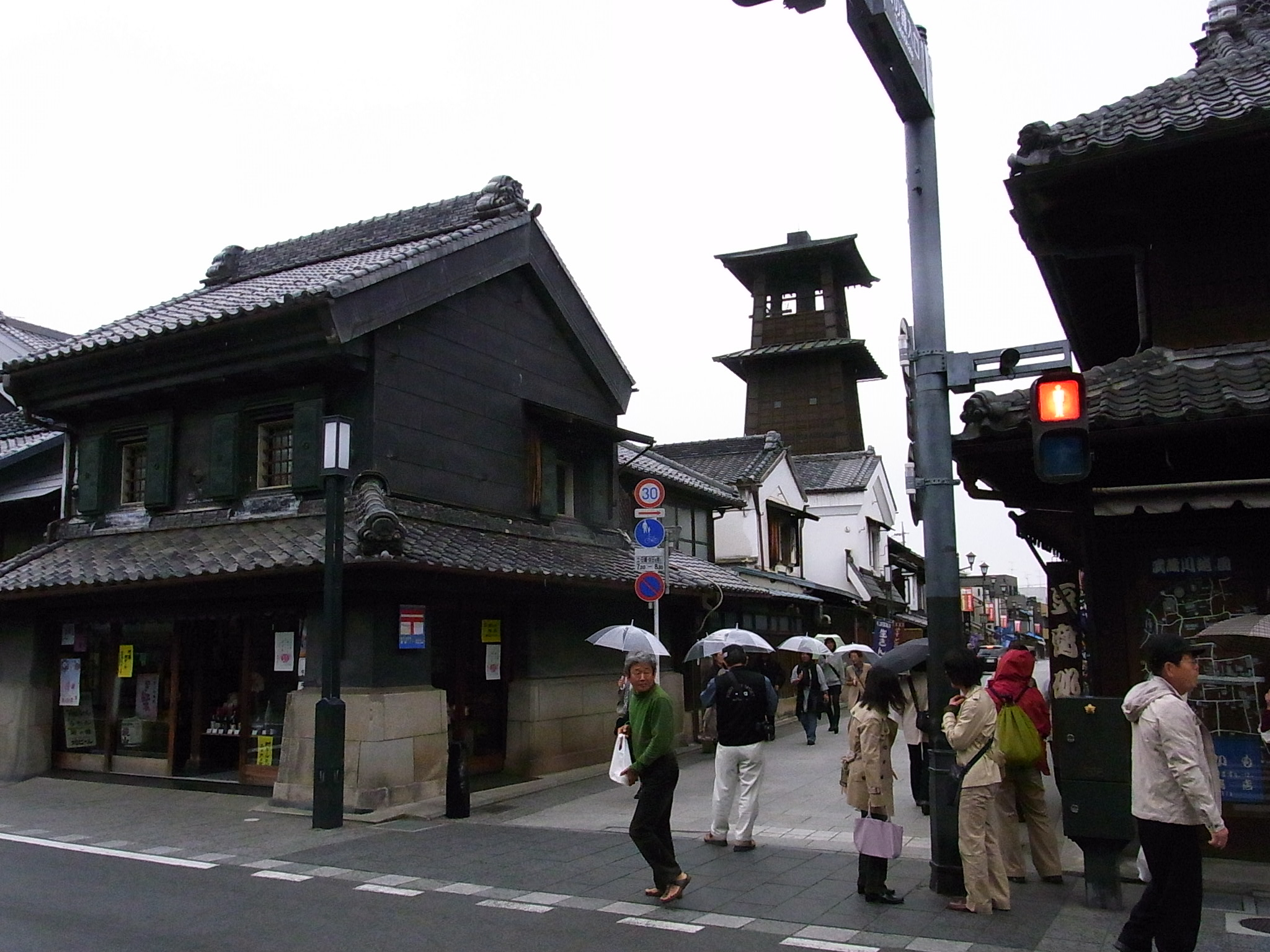 川越 一番館